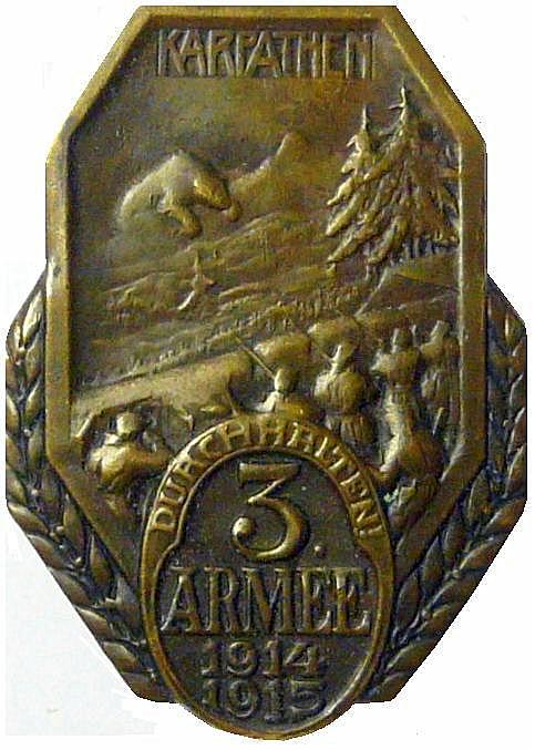 K.u.K Kappenabzeichen der 3. Armee